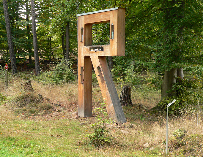 Kunstwanderweg Ars natura bei Bad Zwesten